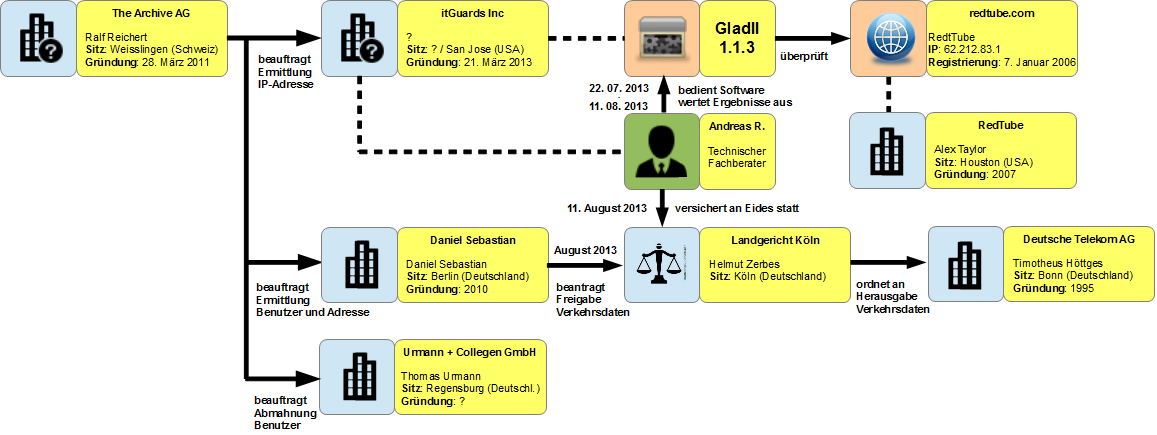 Akteure und Vorgänge beim Abmahnvorgang in der RedTube Abmahn-Affäre